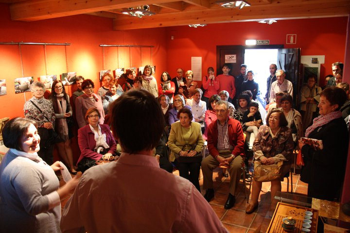 Charra "El té. Historia, ellaboración y ceremonies" d'Henrique G. Facuriella